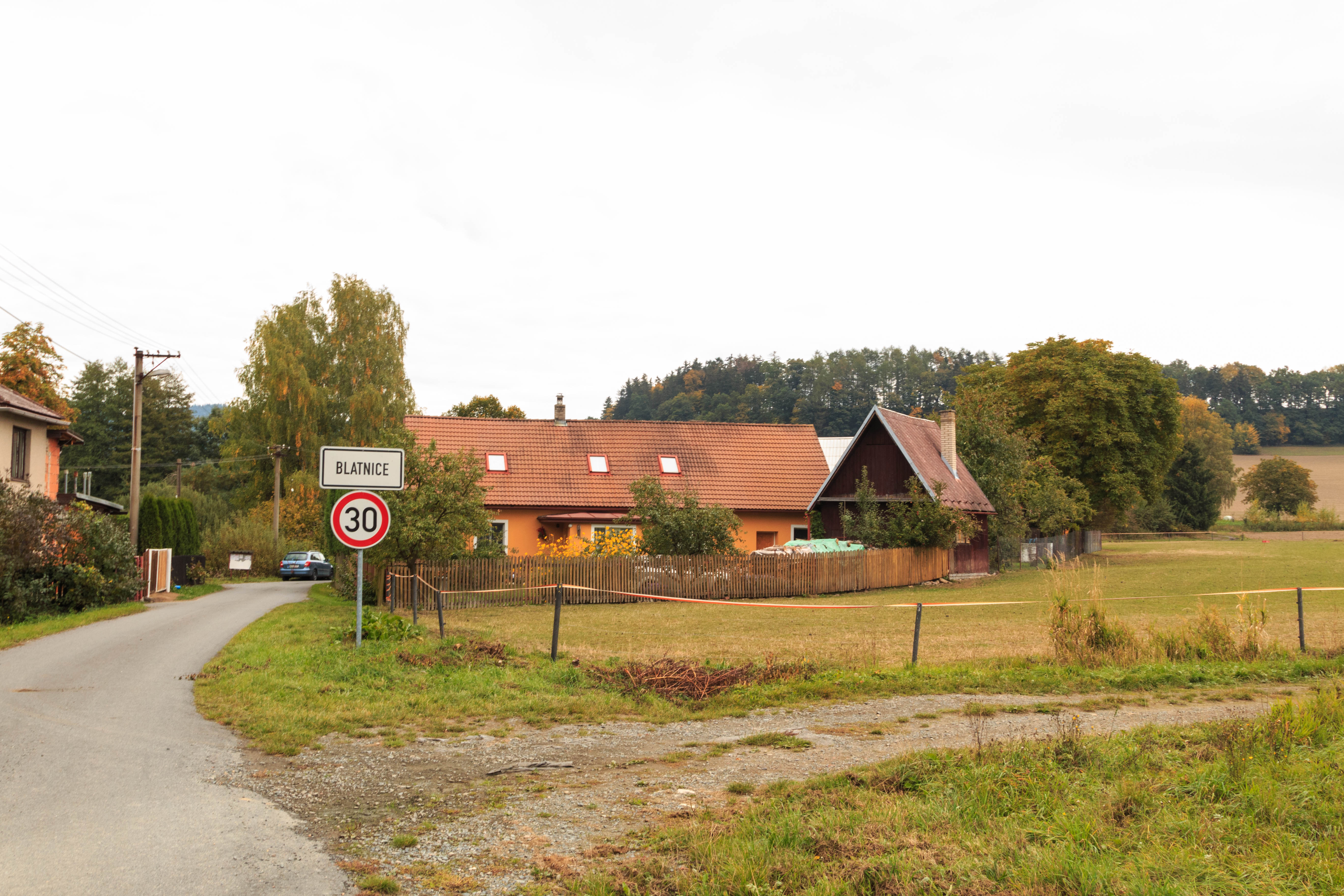 Blatnice č. 8